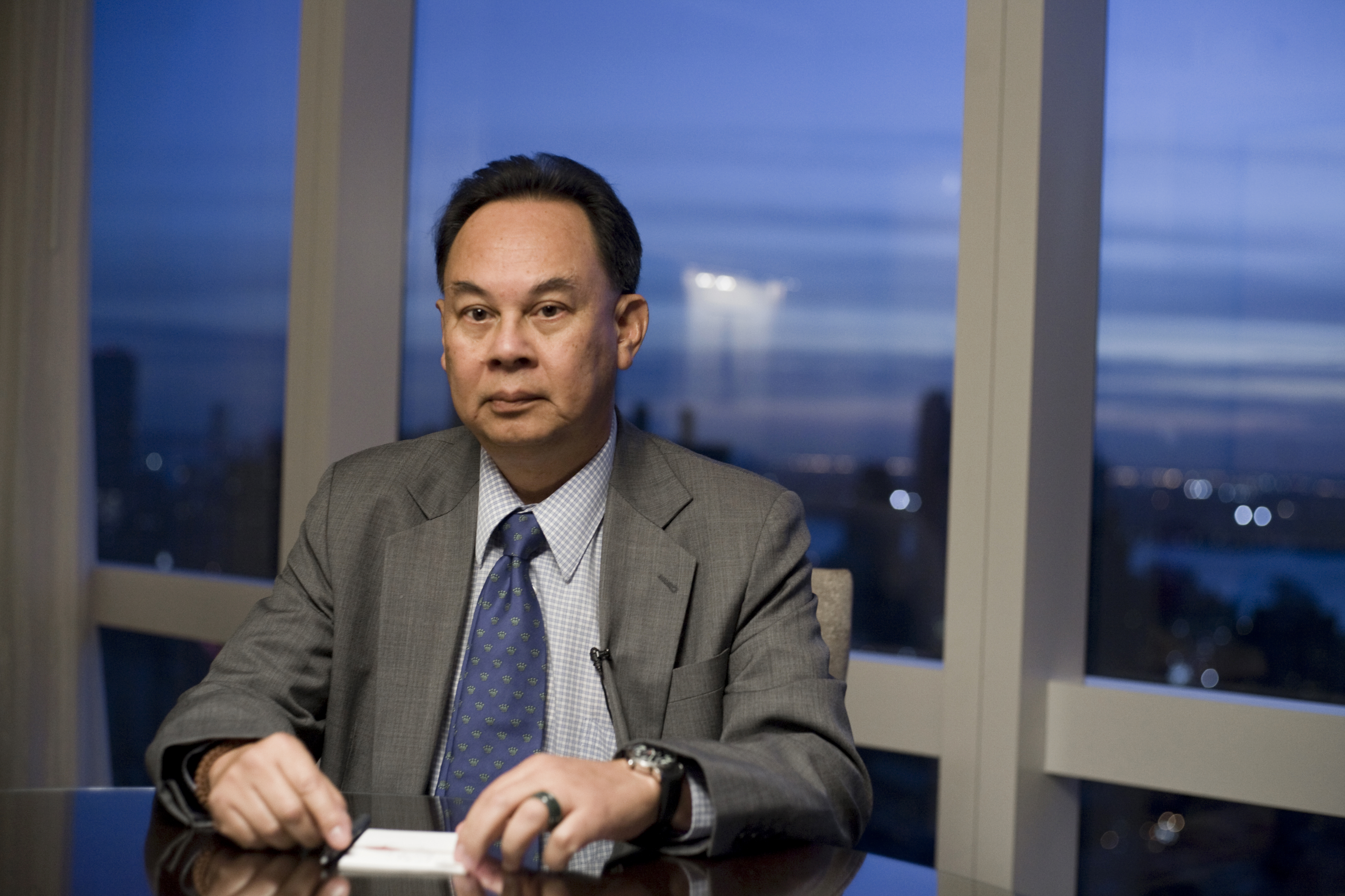 รัฐมนตรีว่าการกระทรวงต่างประเทศ นาย กษิต ภิรมย์ รายการเจาะลึก ครม. / นายกรัฐมนตรี เข้าร่วมการประชุมสมัชชาสหประชาชาติ สมัยสามัญ ครั้งที่ 64 และการประชุม Pittsburgh Summit ณ นครนิวยอร์ก สหรัฐอเมริกา วันที่ 21กันยายน 2552 (The Official Site of The Prime Minister of Thailand Photo by พีรพัฒน์ วิมลรังครัตน์)